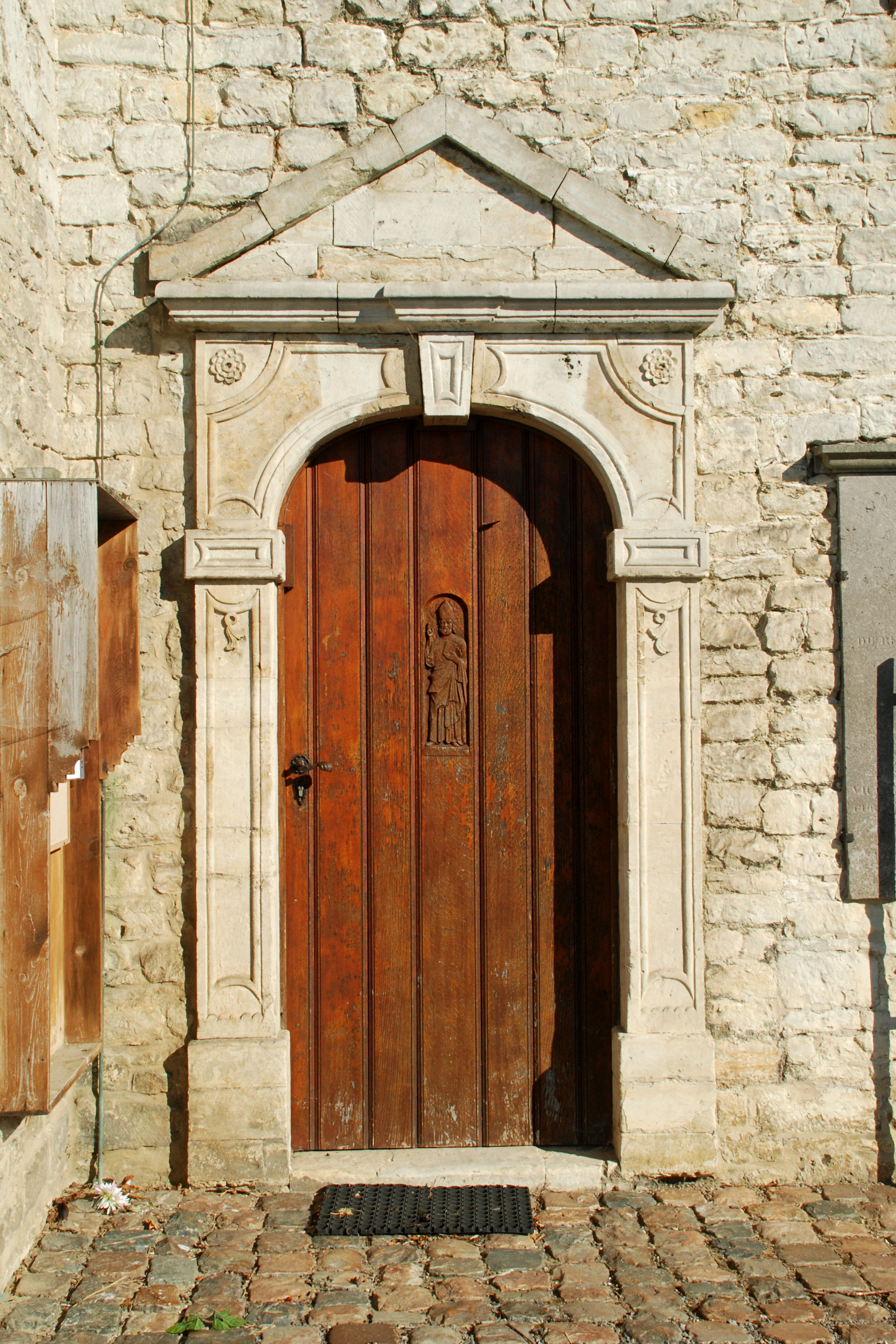 Belgique - Brabant wallon - Jodoigne - Saint-Remy-Geest - Église Saint-Remy